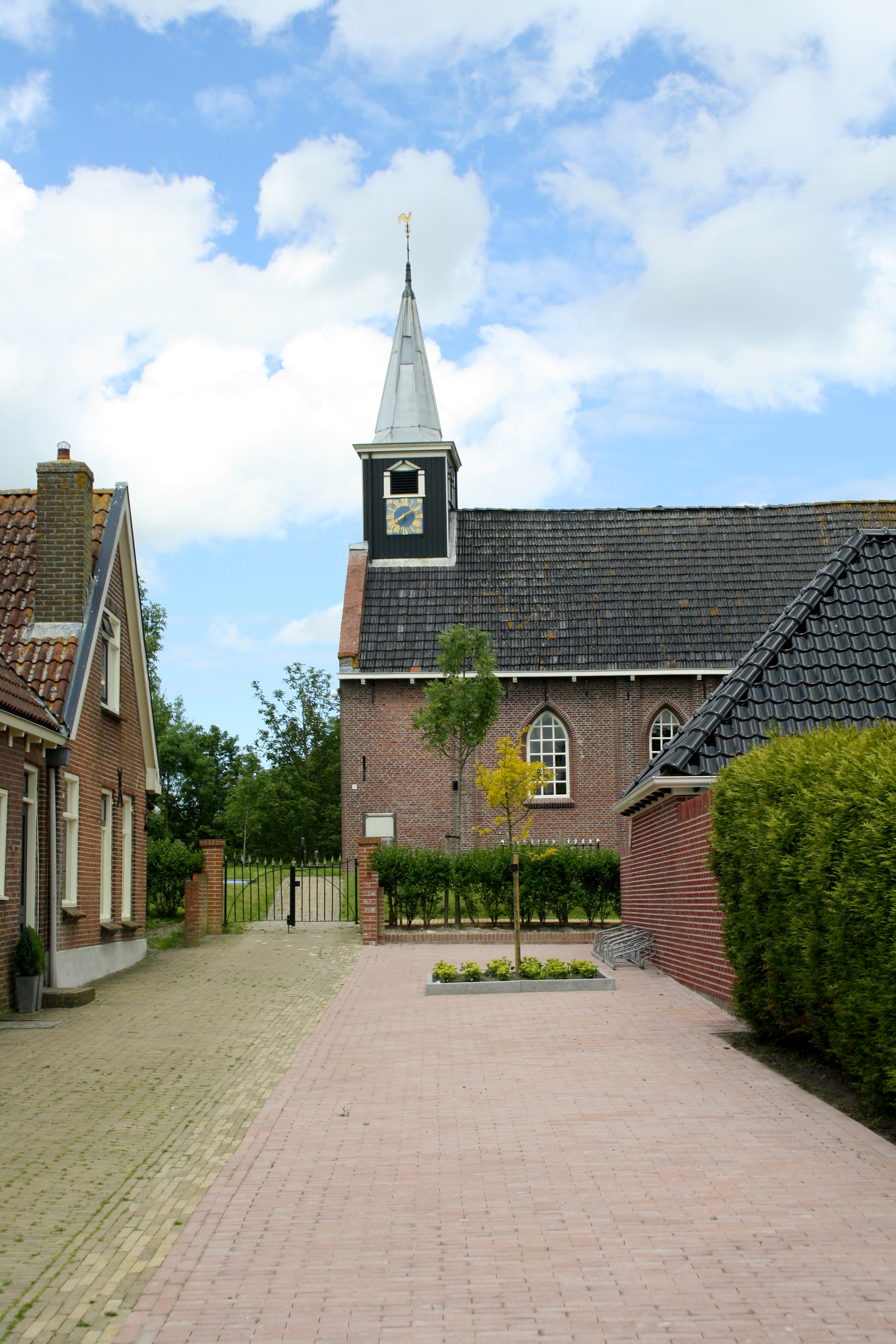 Reitsum- hervormde kerk